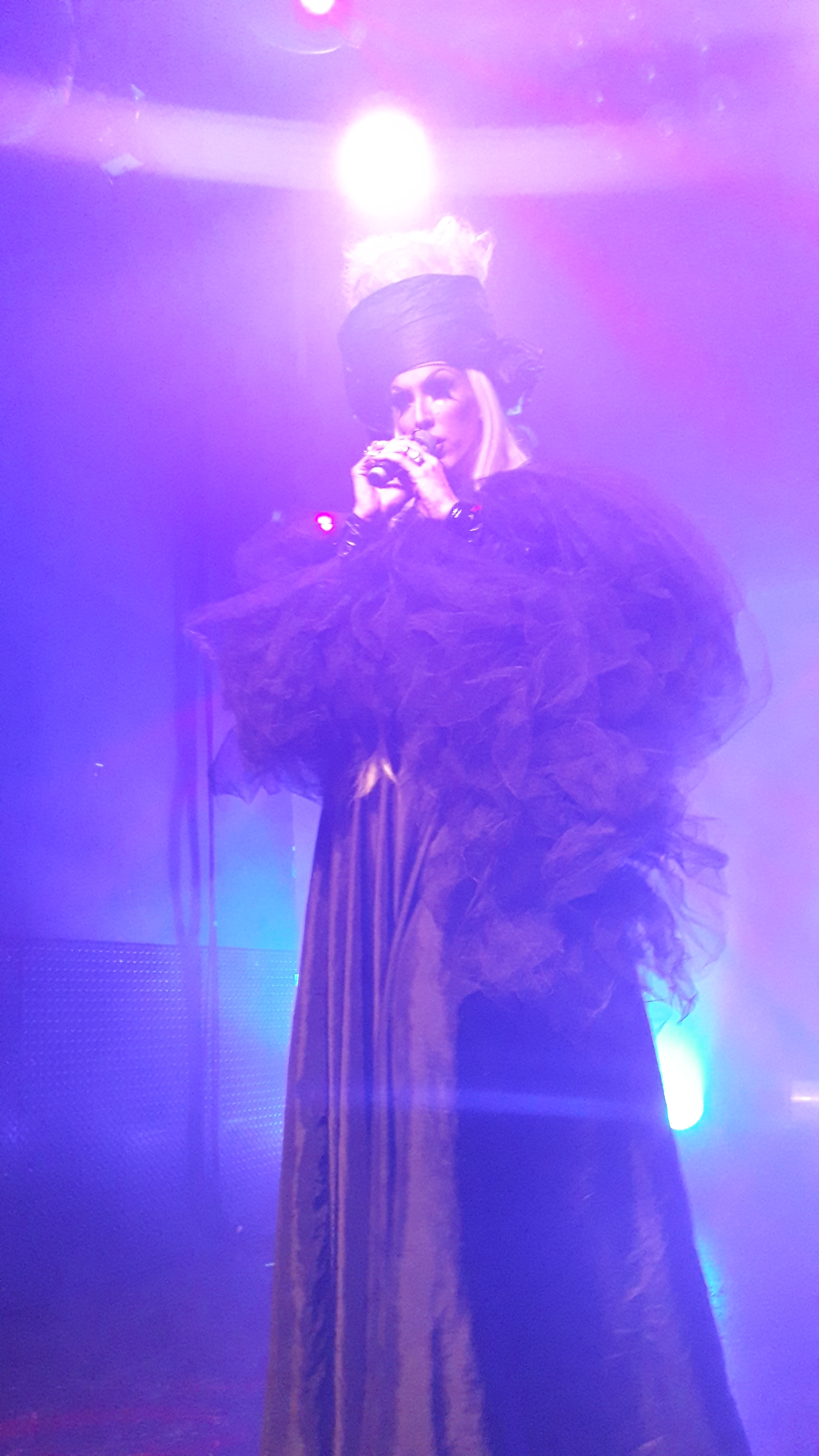 Alaska Thunderfuck 5000 aux Étoiles à Paris le 26 mars 2019.